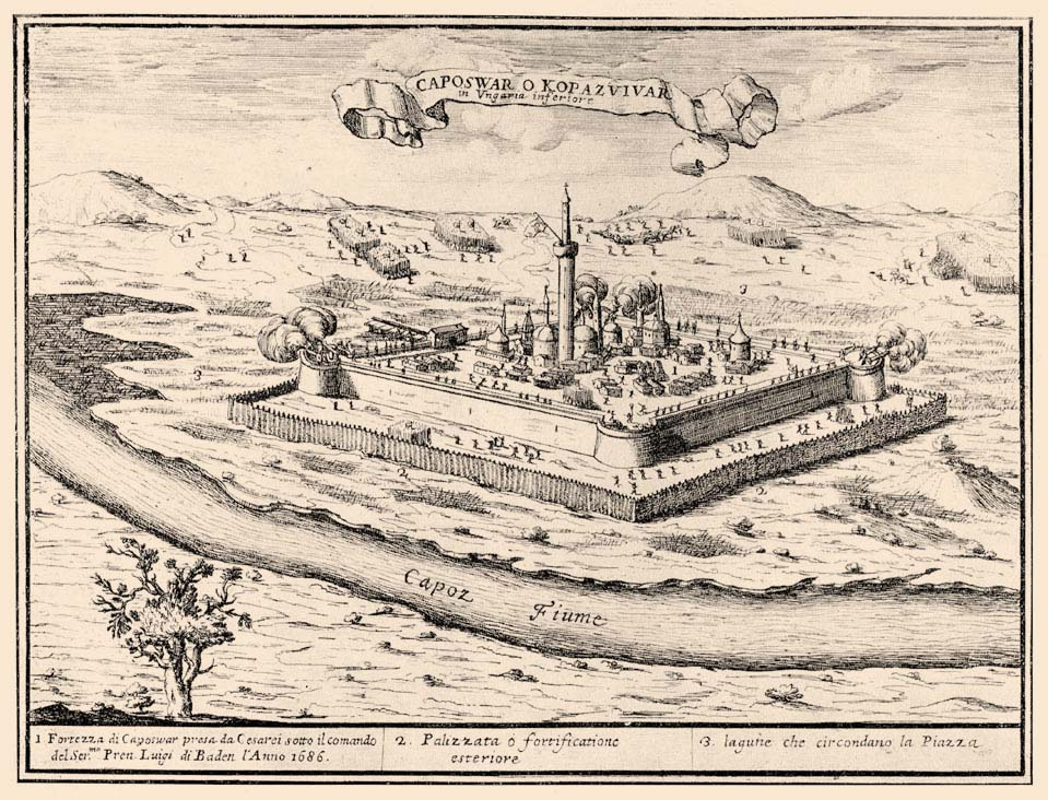 Kaposvár vára 1686-ban